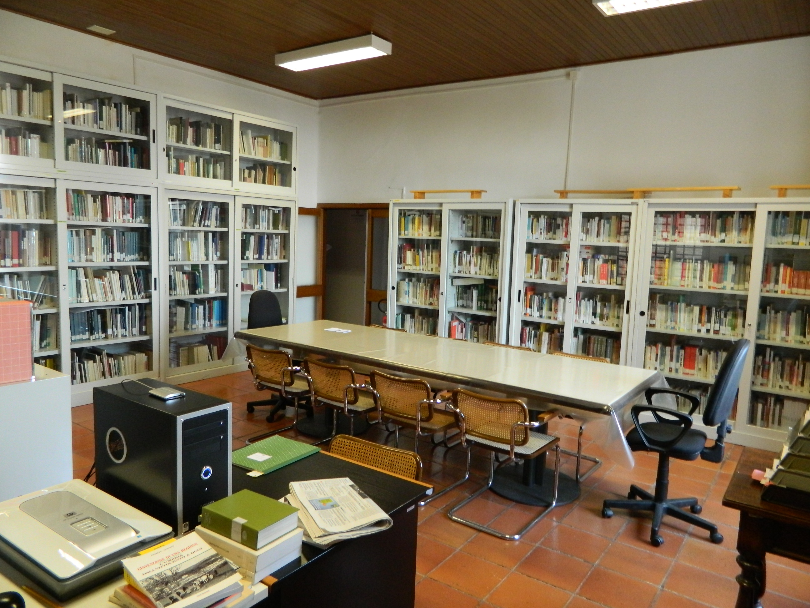 Biblioteca Isuc Sez. Loc. e Monografie